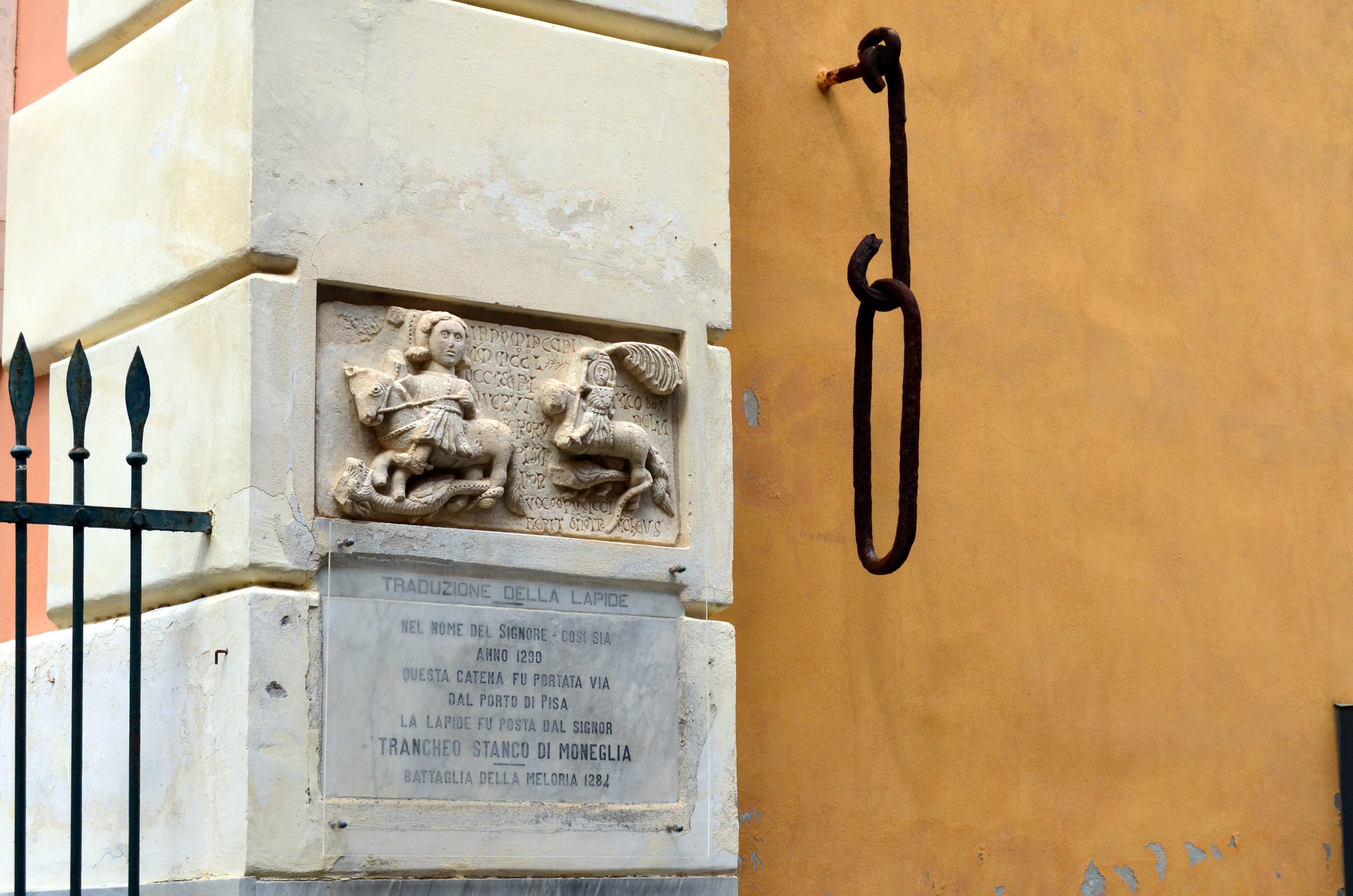 Le catene del porto di Pisa e lapide della battaglia della Meloria a Moneglia, Liguria, Italia